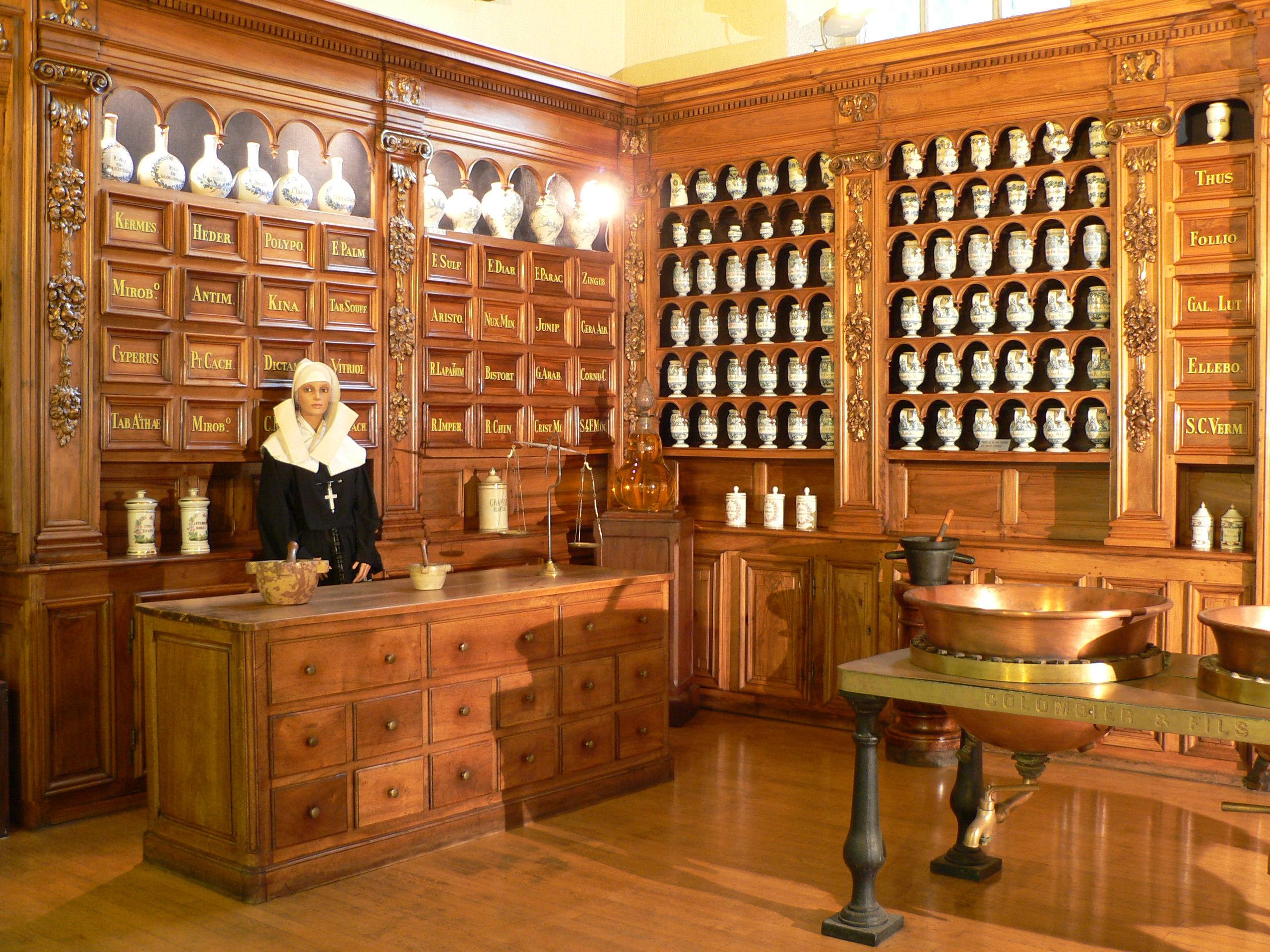 Aphoticairerie de l'Hôtel-Dieu de Lyon; reconstitution ; musée des Hospices civils de Lyon, inv. 2007.0.959.M